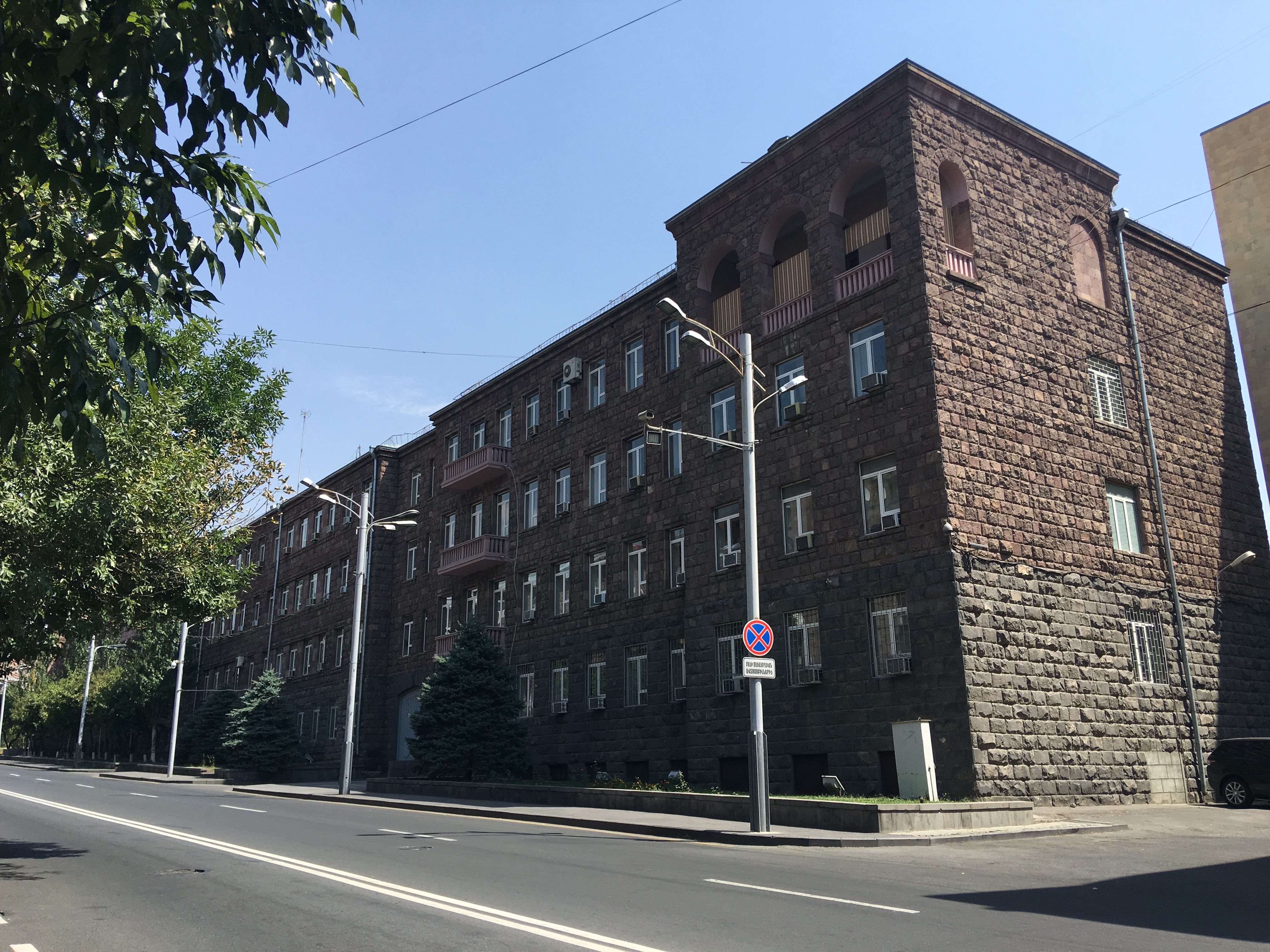 Շենք՝ Նալբանդյան փողոց, 104 շենք, Երևան 0001, Հայաստան հասցեով, որտեղ տեղակայված է Հայաստանի ազգային անվտանգության ծառայությունը: 6/165